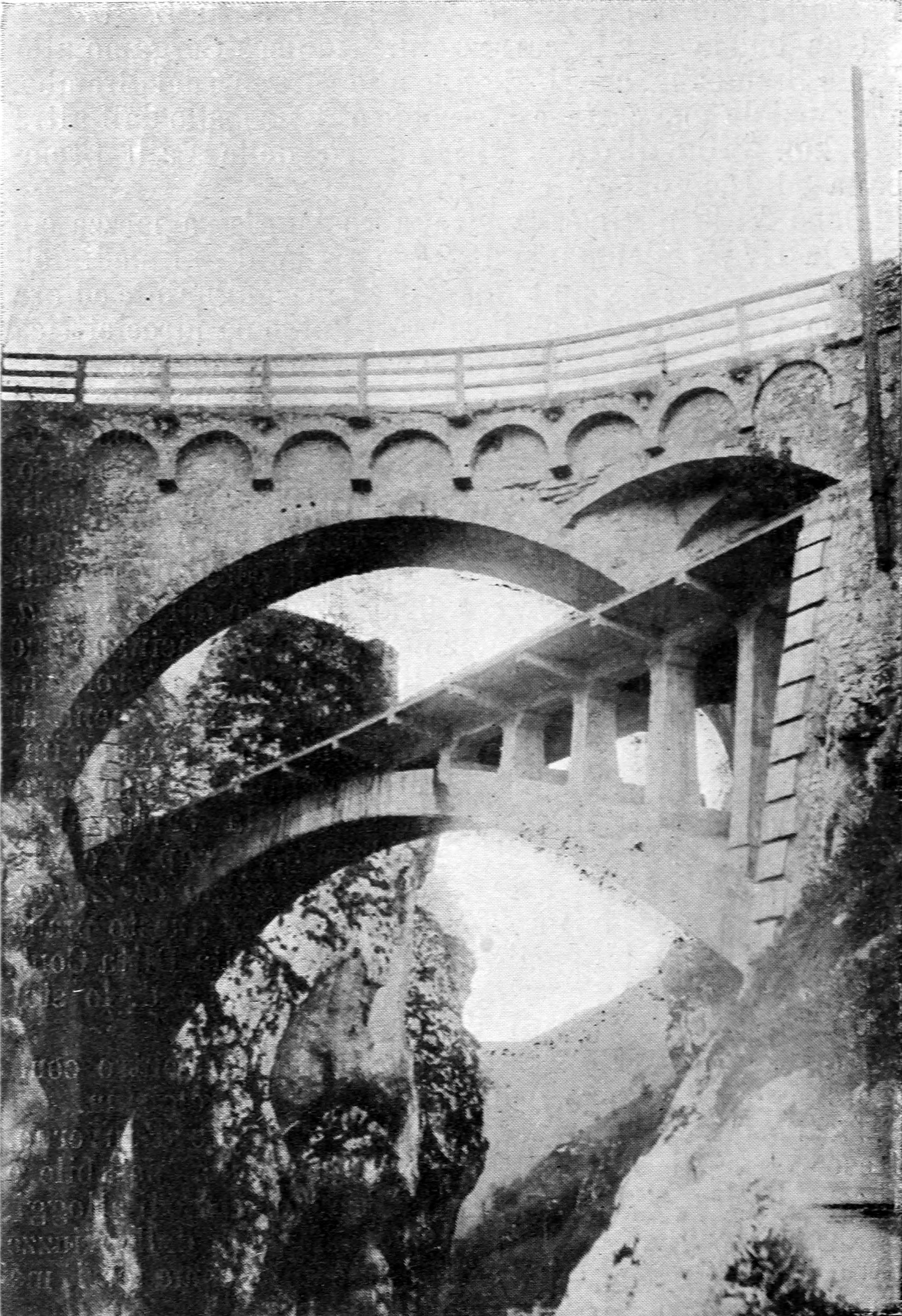 Immagine dal libro Bergamo e sue valli, Brescia e sue valli, Lago d'Iseo, Valcamonica, Società Anonima Guide Lampugnani, Milano, 1900 - ponti di Sedrina